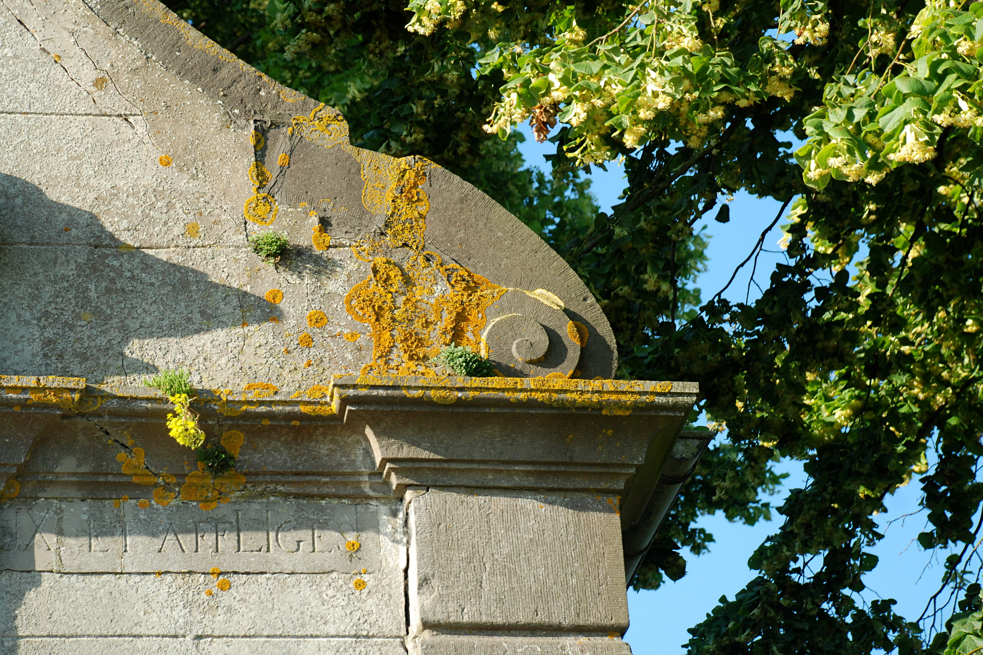 Belgique - Brabant wallon - Villers-la-Ville - Marbais - Chapelle Notre-Dame Auxiliatrice du Triolet